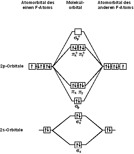 MO-Schema F2